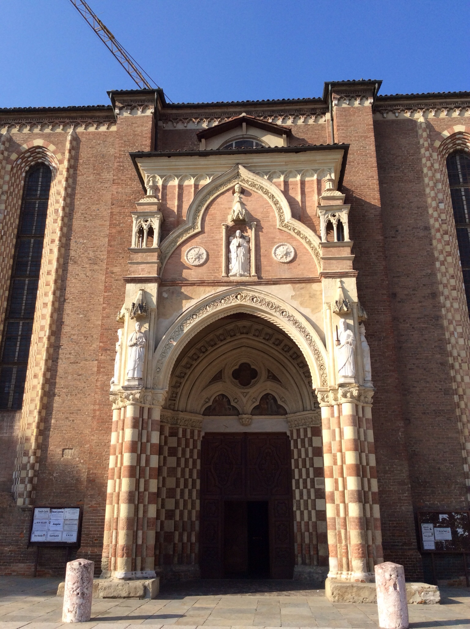 Complesso Episcopale della Cattedrale This is a photo of a monument which is part of cultural heritage of Italy.